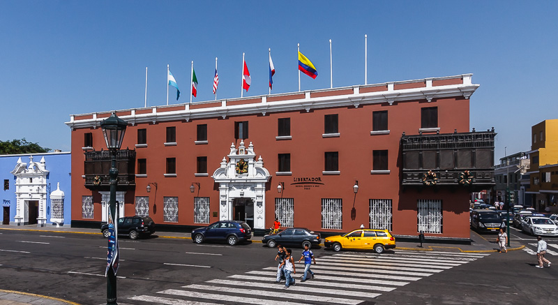 Trujillo, La Libertad, Perú